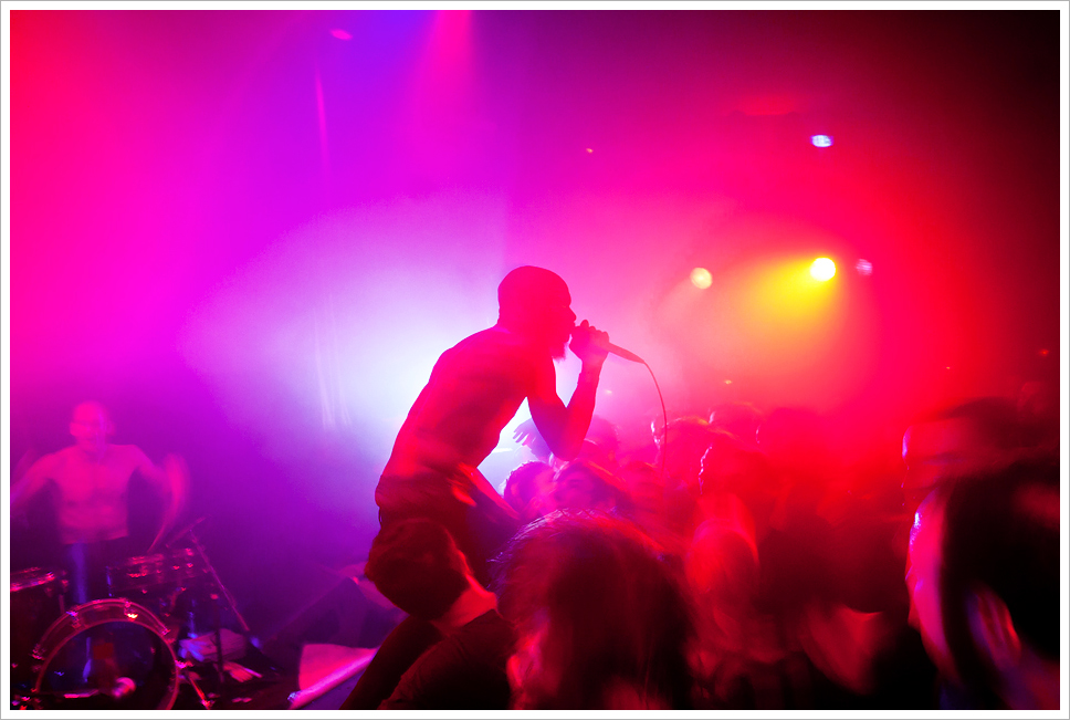 Death Grips live at Festsaal Kreuzberg